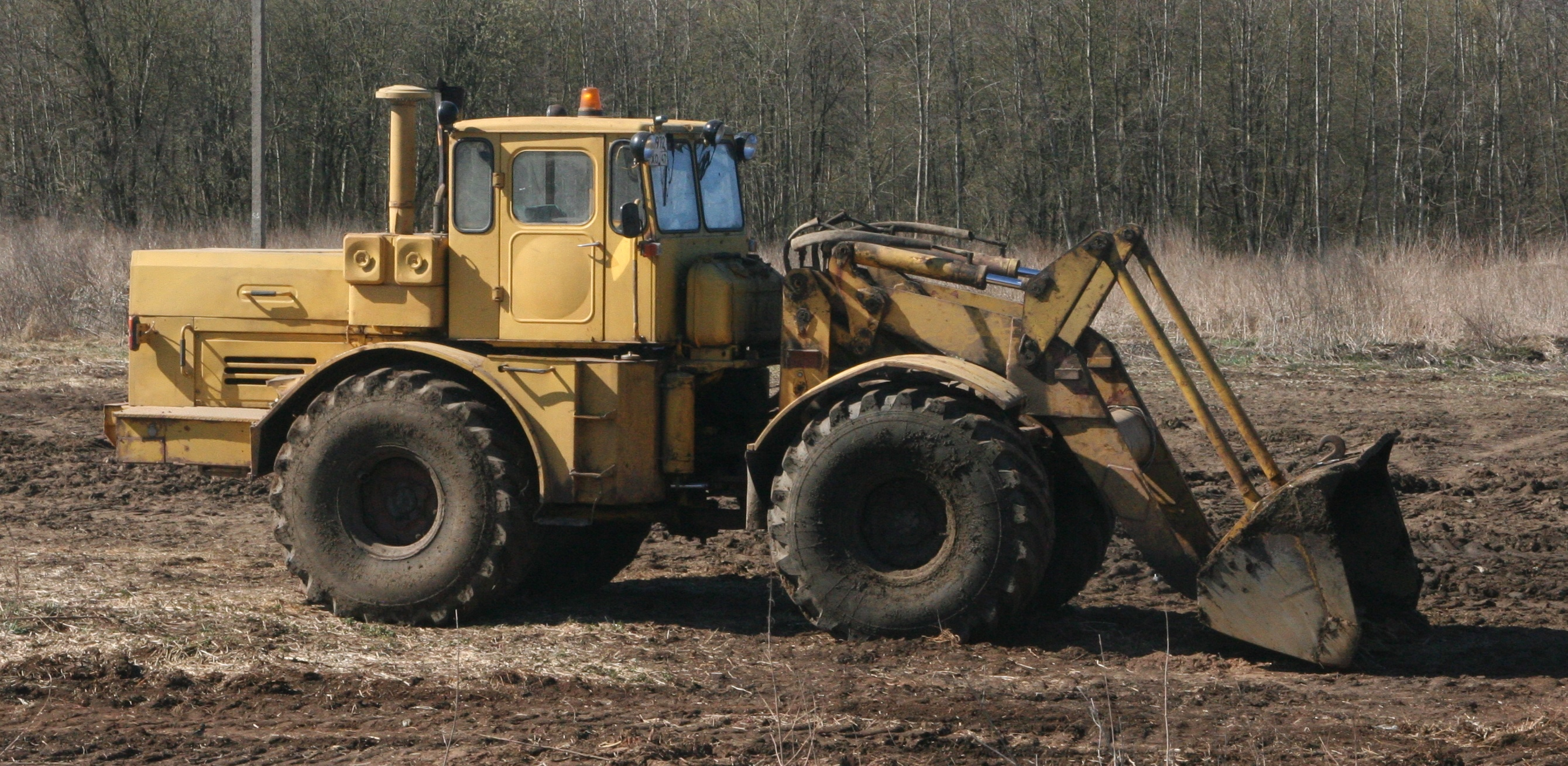 Ein Kirovets-Traktor auf einem landwirtschaftlichen Betrieb im russischen Dorf Alexino, 130km nordöstlich von St. Petersburg